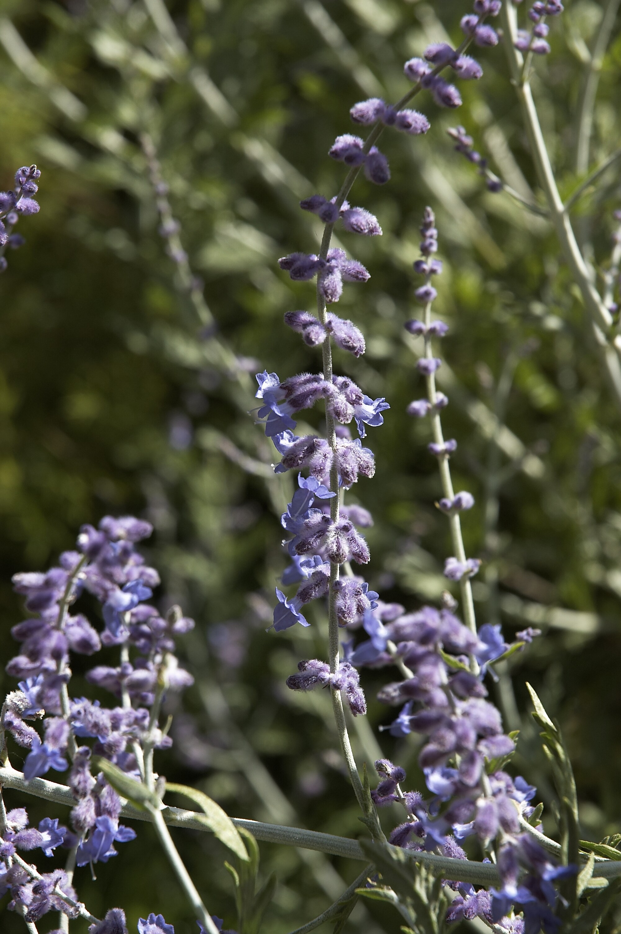 Perovskia atriplicifolia 'Blue Spire'